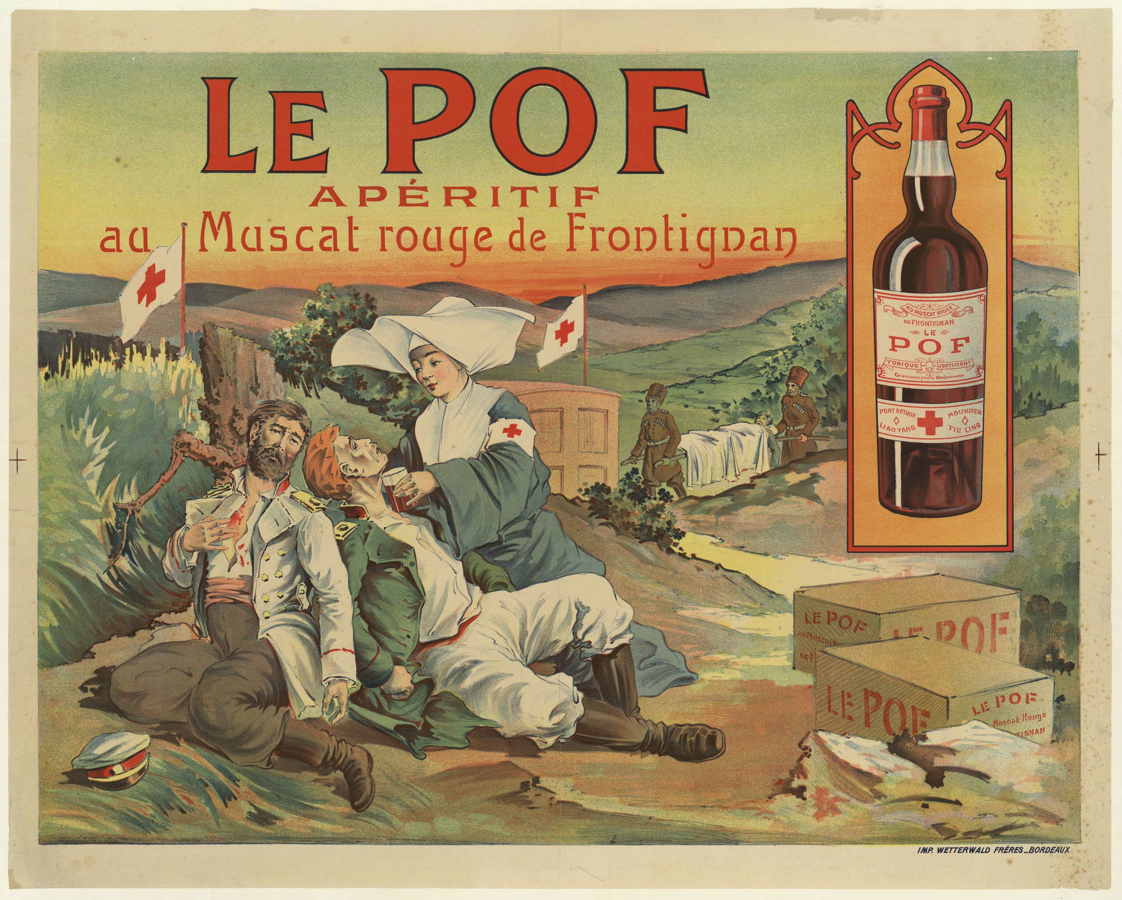 Le POF, apéritif au Muscat rouge de Frontignan : affiche publicitaire.